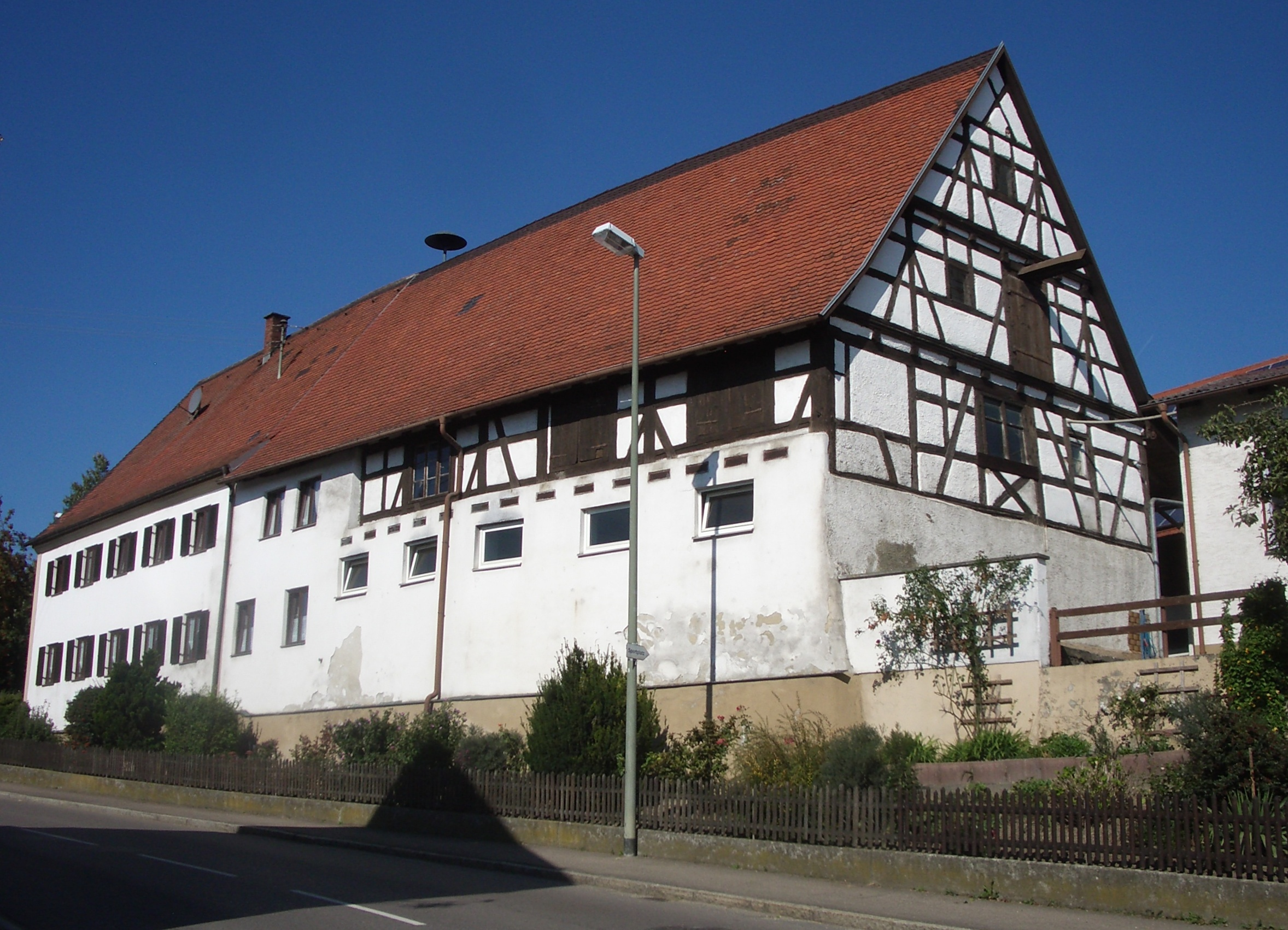 Ehemaliger Vogteihof in Großkötz, Gemeinde Kötz, Landkreis Günzburg (Günzburger Str. 2)This is a photograph of an architectural monument.